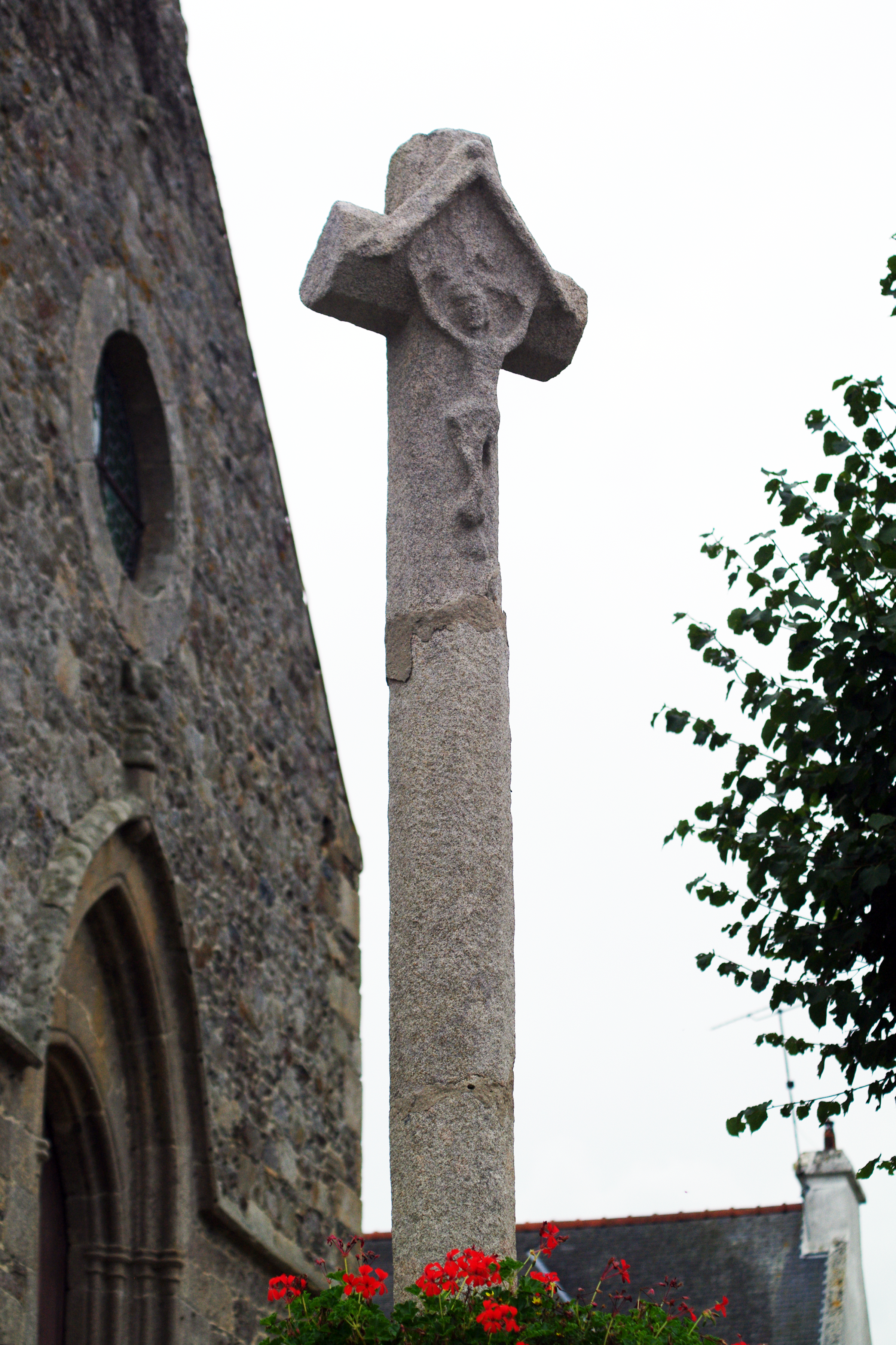 Chapelle Notre-Dame de Hirel et croix monumentale près de la chapelle, (Inscription, 1953).